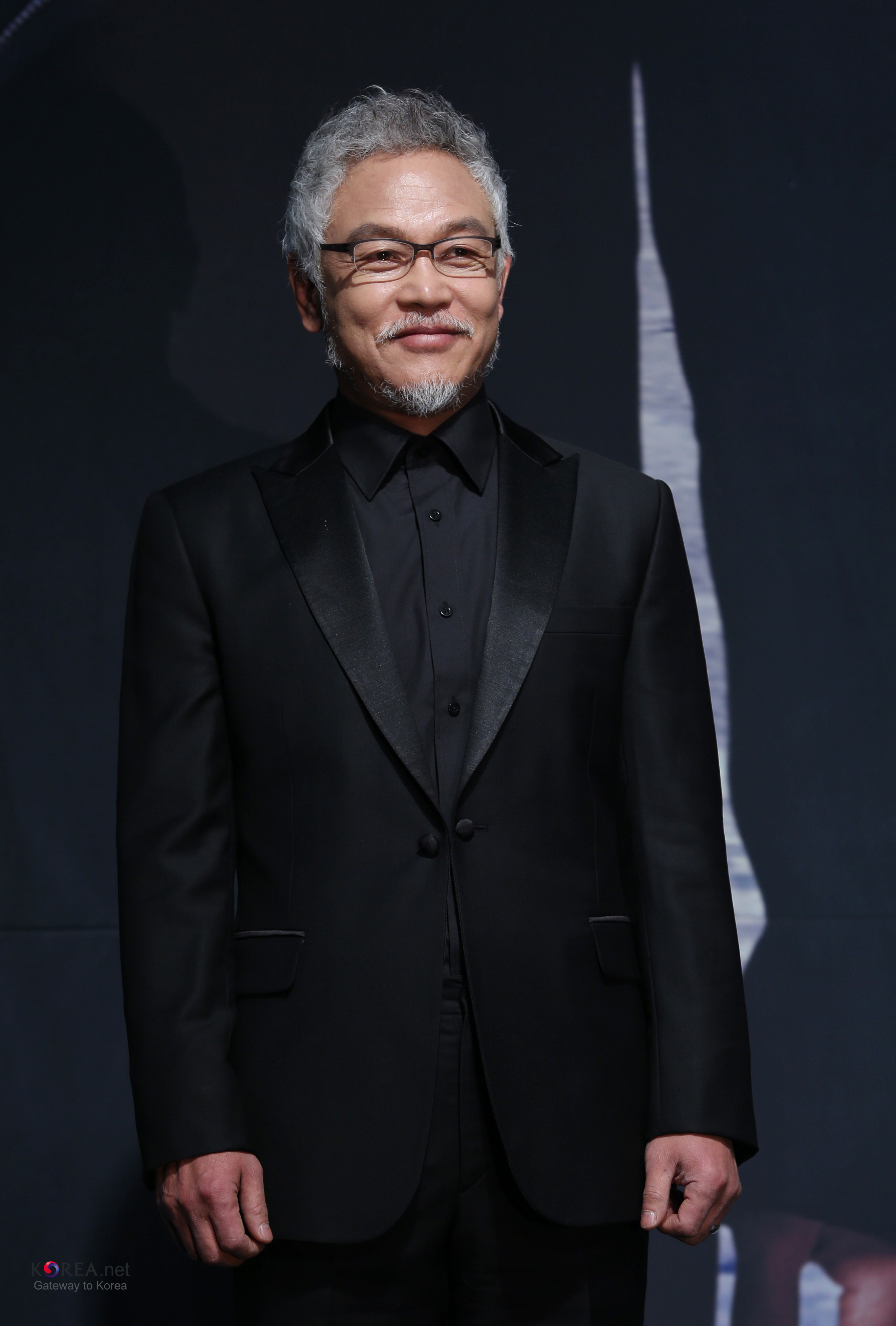 K-Drama 'IRIS 2' Press Conference Kim Young-chul Lotte Hotel, Seoul 2013.02.07. Ministry of Culture, Sports and Tourism Korean Culture and Information Service Jeon Han Articles about IRIS2 Korean blockbuster drama Iris returns (日本語) 韓国ドラマ、2013年のキーワードは“アクション” ブロックバスタードラマ「アイリス(IRIS)２」、いよいよ放映 (中文) 2013年韩剧的关键词为“动作” 风靡一时的韩剧《IRIS》将重返荧幕 (Vietnamese) Phim truyền hình hành động lên ngôi năm 2013 Phần 2 của phim truyền hình bom tấn 드라마 아이리스2 제작발표회 아이리스 1편에서 NSS 국장 백산 역할을 맡아온 김영철 롯데호텔, 서울 문화체육관광부 해외문화홍보원 코리아넷 전한